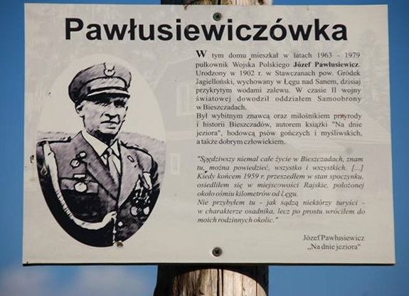 Надпись: Павлусевичёвка. В этом доме с 1963 по 1979 год жил полковник Польской Армии Юзеф Паулесевич. Родился в 1902 год в Ставчанах. Во время Второй мировой войны руководил отрядом самообороны в Бещадах. Был большим знатоком края и любителем природы, автор книги" На дне озера", заводчиком охотничьих гончих собак, также хорошим человеком.